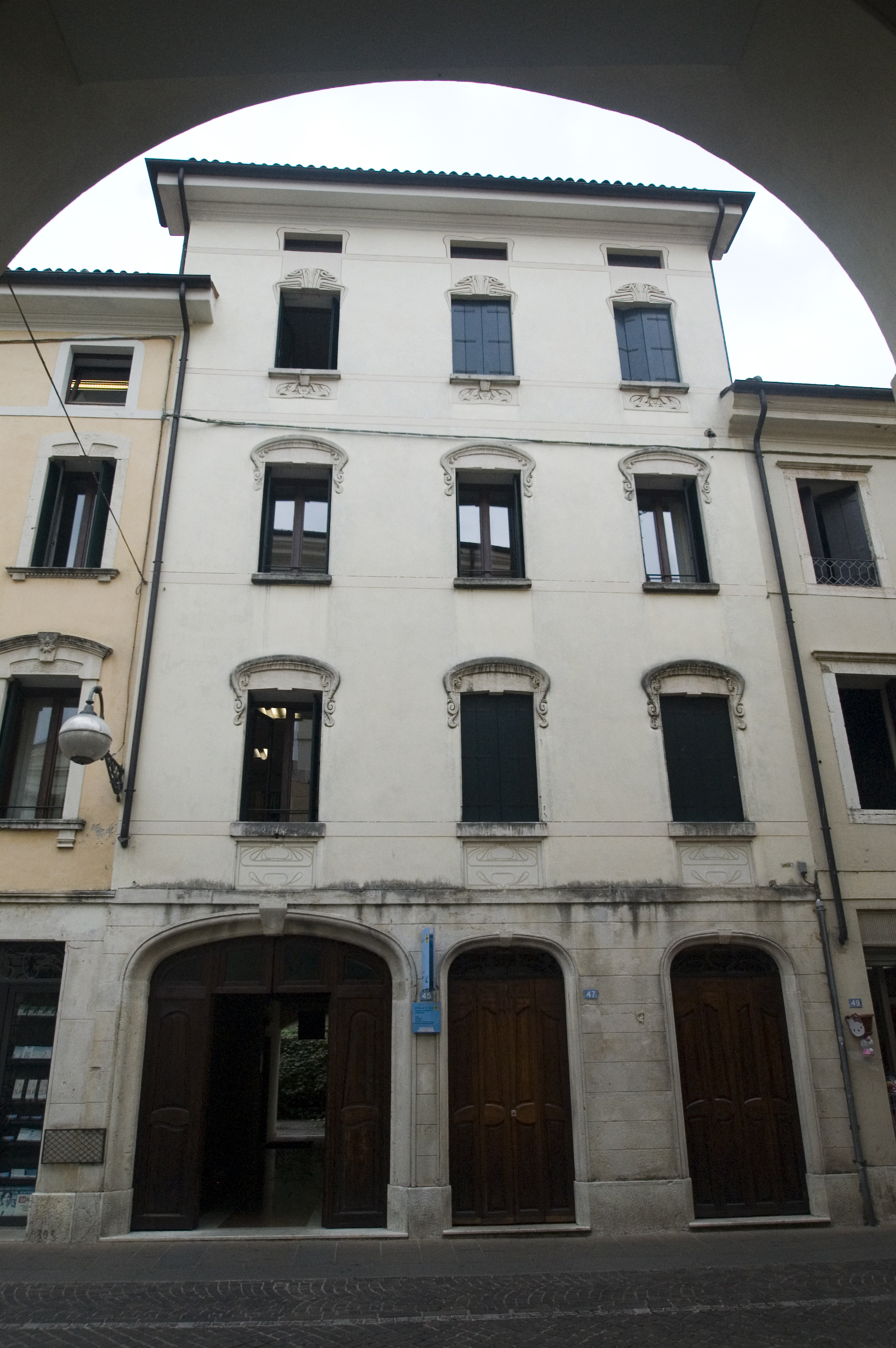 Palazzo ex Tomasi This is a photo of a monument which is part of cultural heritage of Italy.